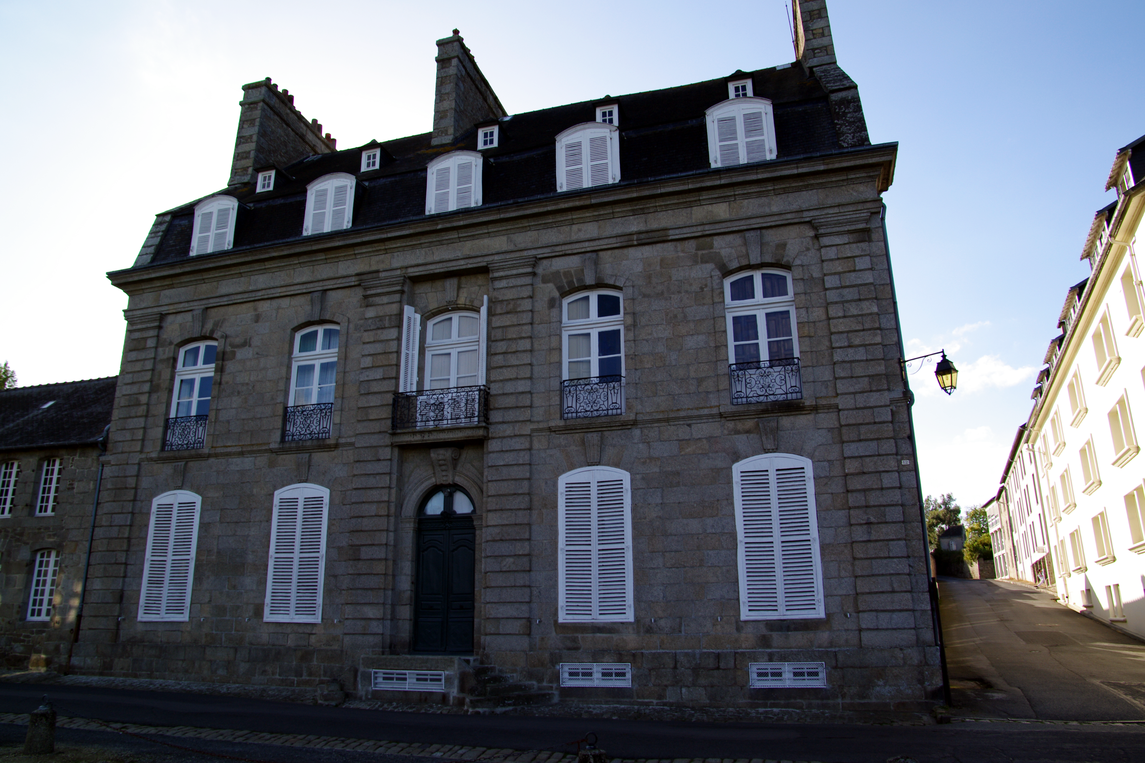 Ancien hôtel Veillet-Dufrêche, Bourg-Neuf (rue du) ; Veillet-Dufrêche (rue) 12 (Inscription, 1969) .